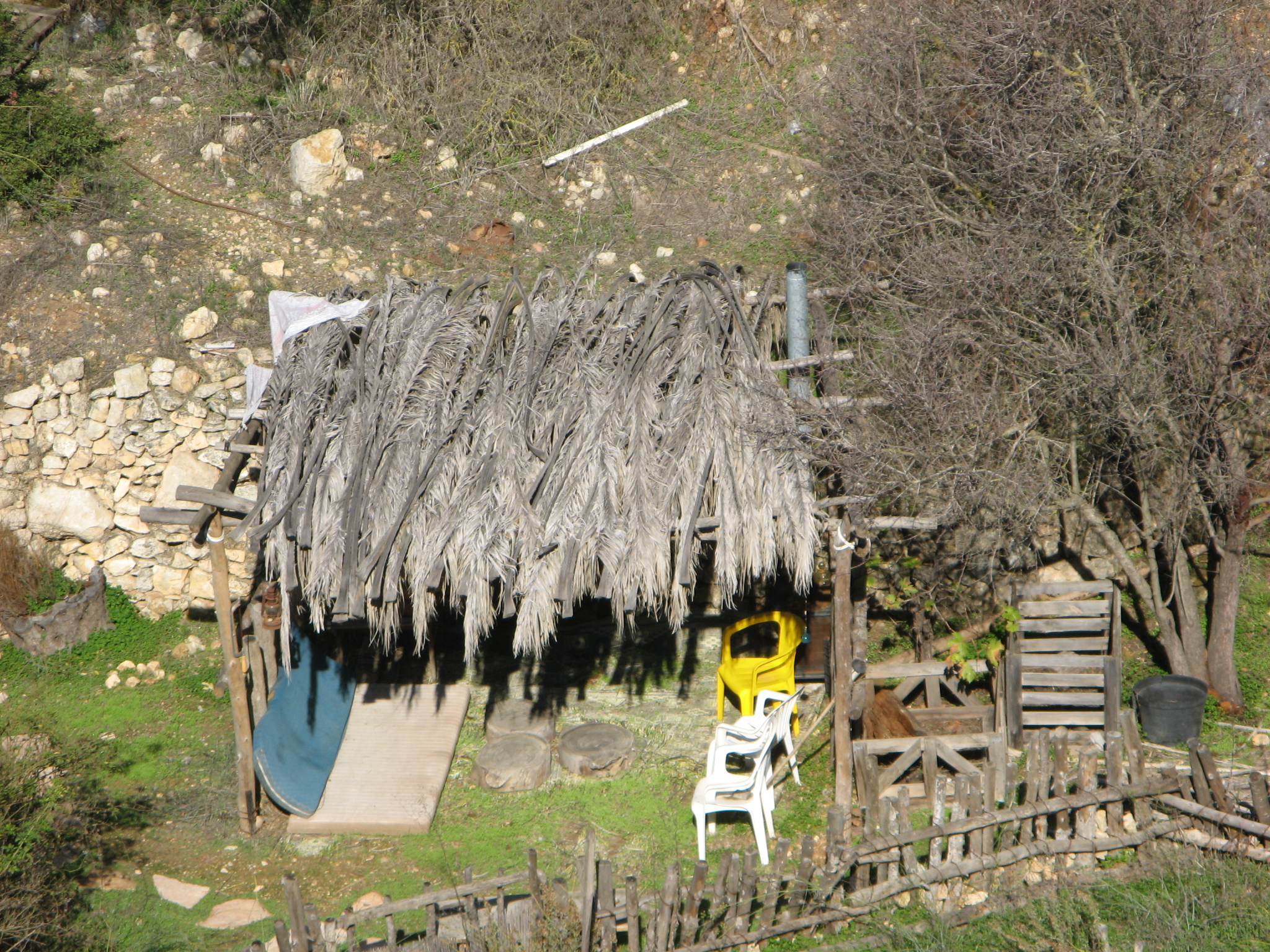 Sukka in Ein Kerem in mid winter